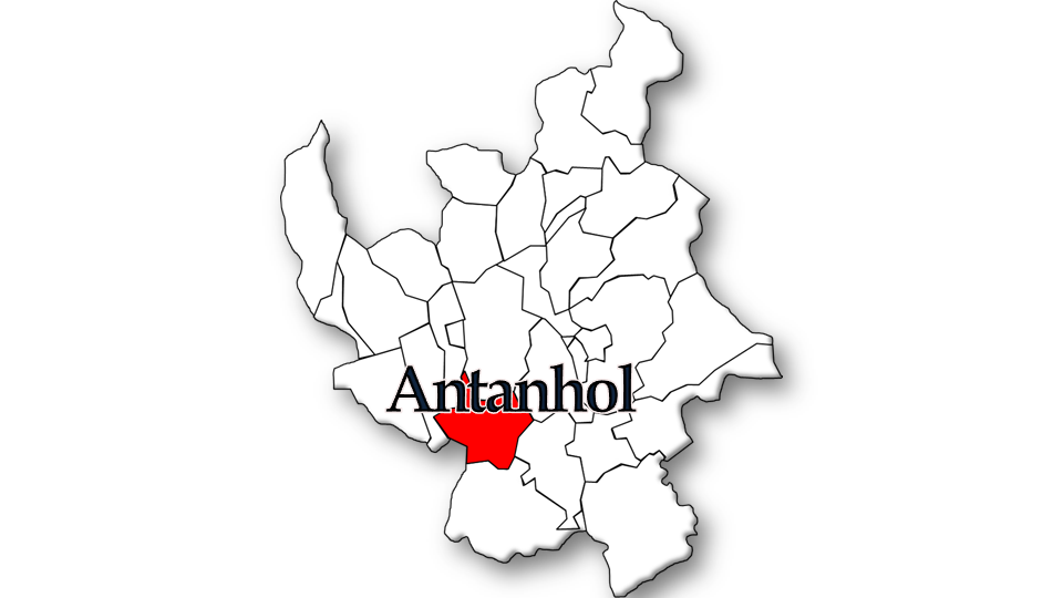 População